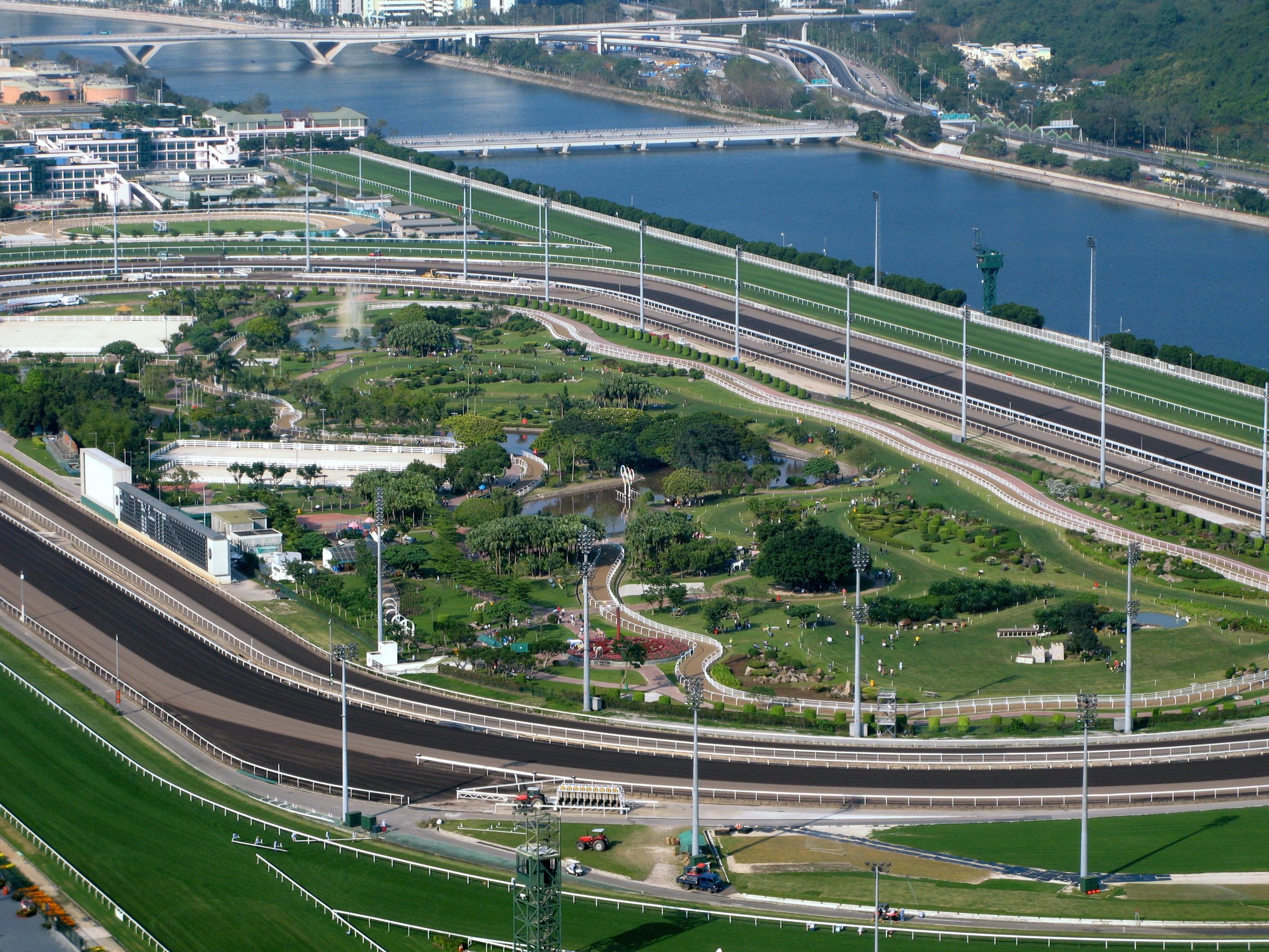 Penfold Park 彭福公園